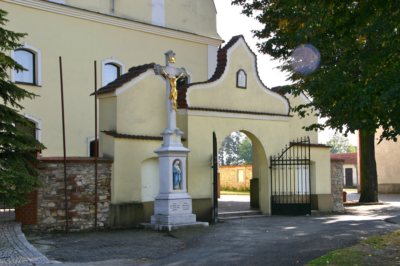 Mechnica - kościół parafialny p.w. św. Jakuba, 1794